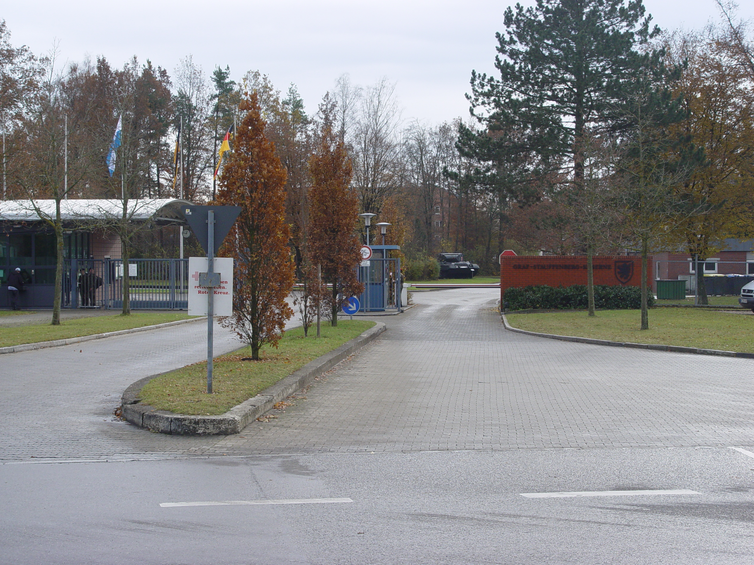 Einfahrt der Graf-Stauffenberg-Kaserne in Sigmaringen